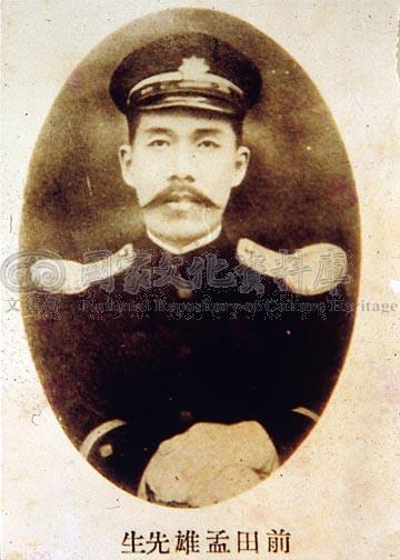 士林國民小學第五任校長前田孟雄，身穿前期判任官服制。